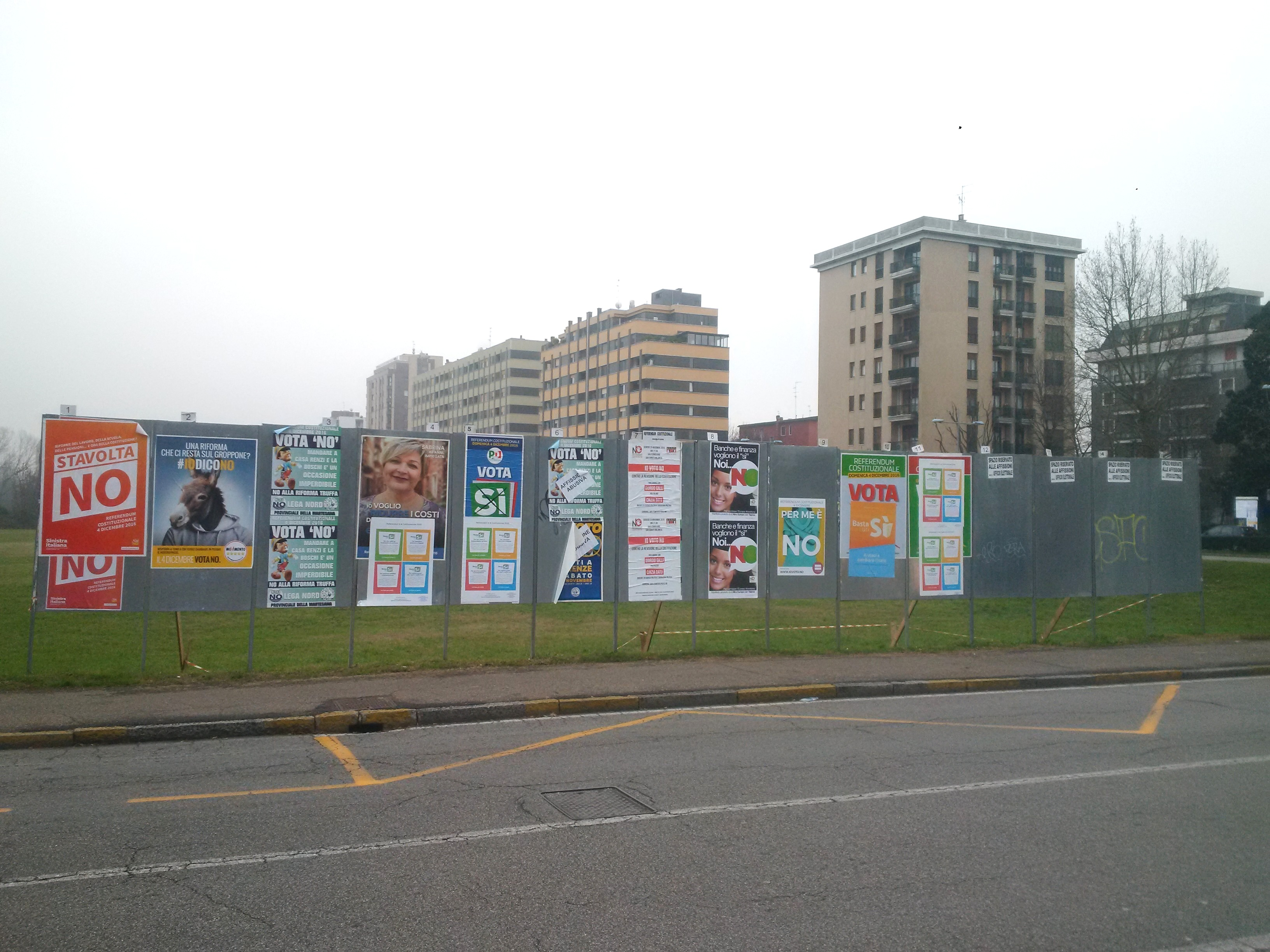 Manifesti accanto al Municipio di San Donato Milanese per il referendum di dicembre 2016 (dove erano presenti i manifesti meno vandalizzati); sono presenti Sinistra Italiana, Movimento 5 Stelle, Lega Nord, Comitato Basta un SÌ, Partito Democratico, L'altra Europa con Tsipras, Alternativa libera, Possibile, gruppo deputati per il SÌ, gruppo senatori per il SÌ.